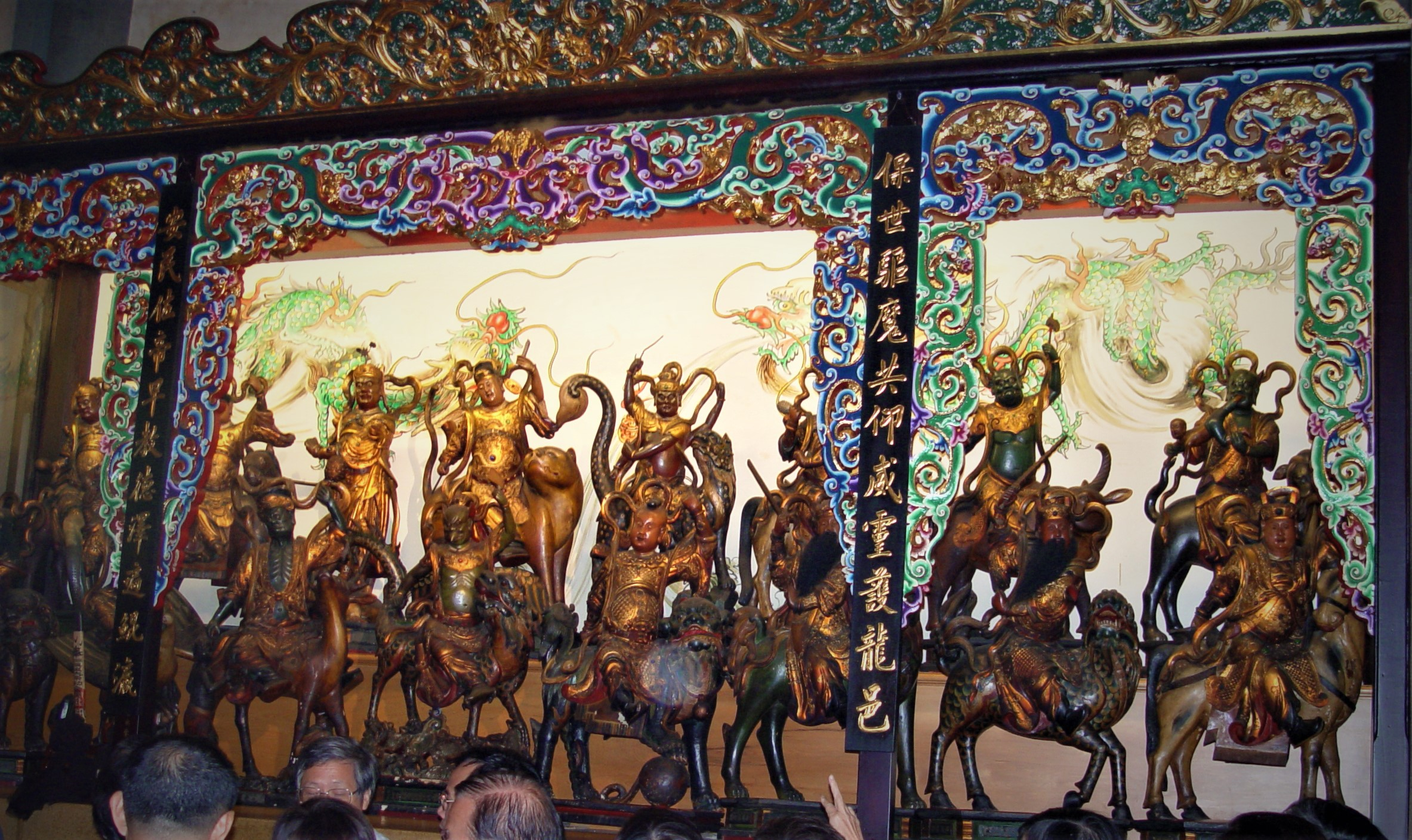 中文（台灣）: 大龍峒保安宮正殿內36官將1